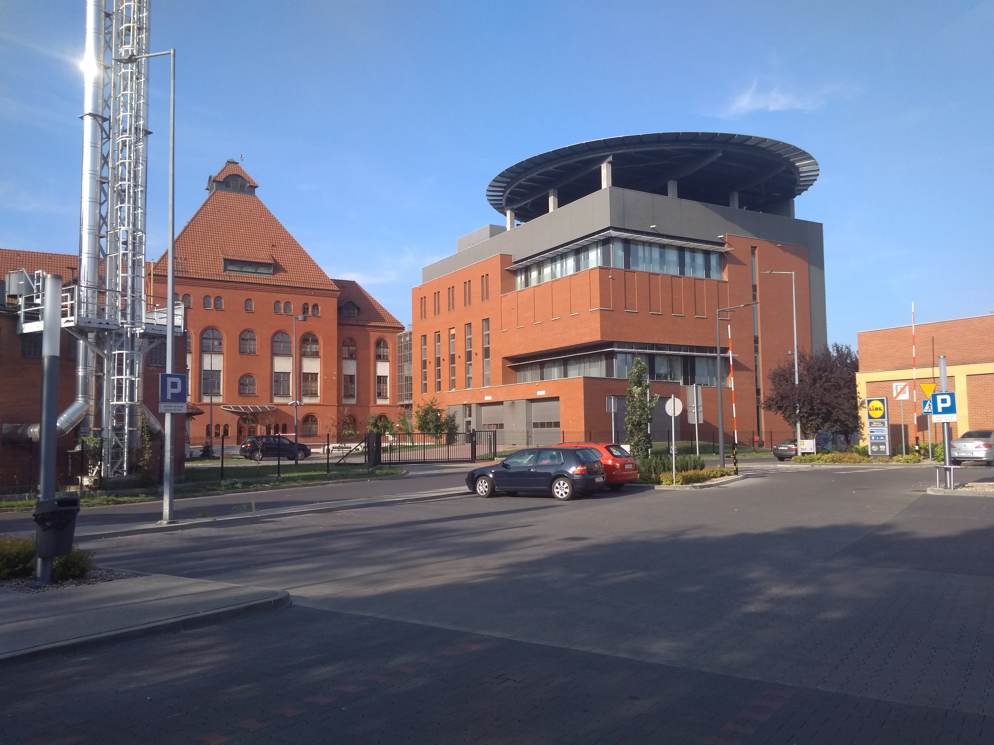 Centrum Leczenia Oparzeń im. dr. Stanisława Sakiela w Siemianowicach Śląskich